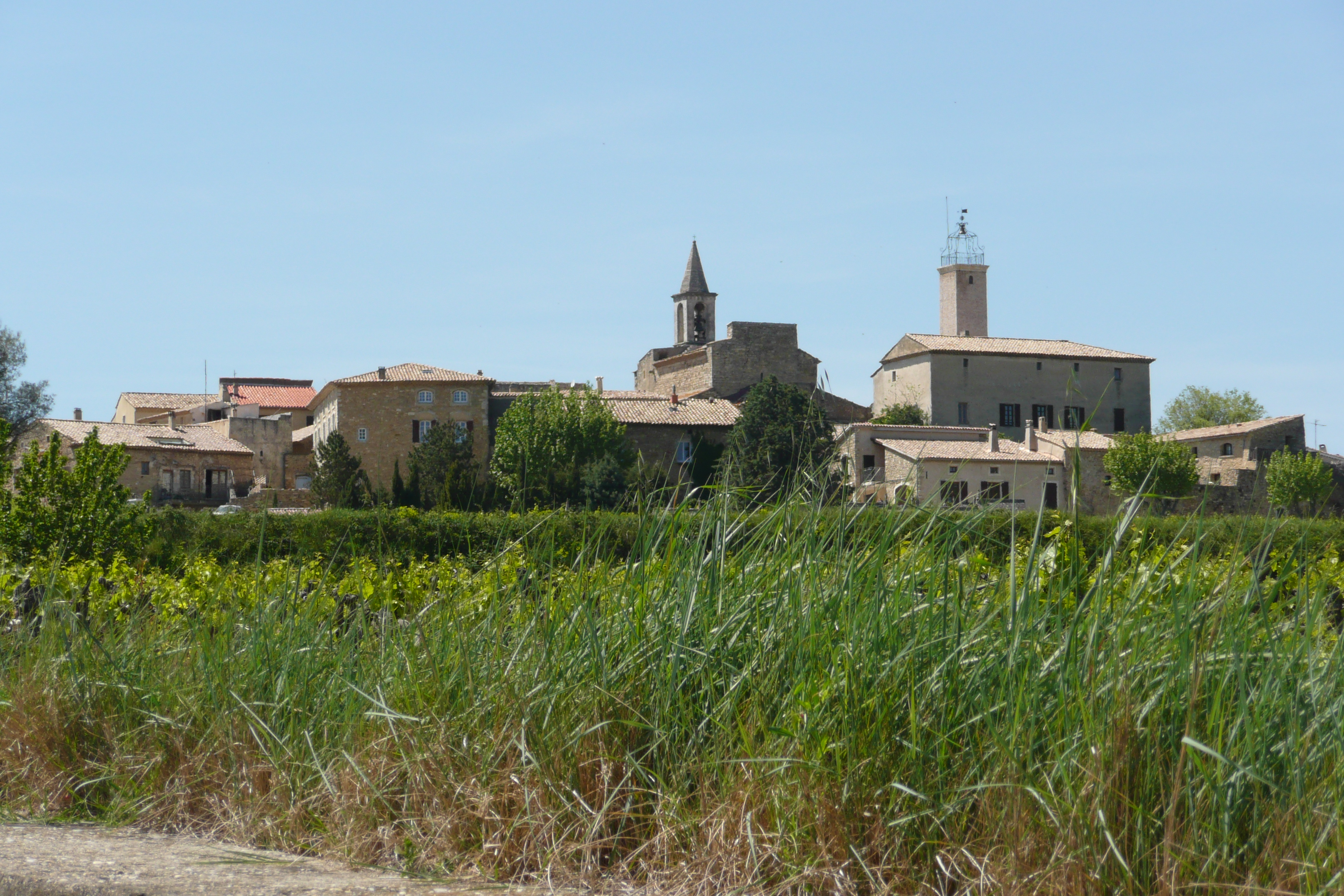 Vue d'ensemble sur Saint-Alexandre (Gard).